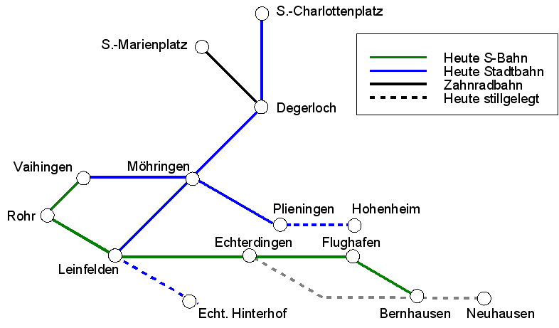 Übersichtskarte der Filderbahnstrecken (Stuttgart)